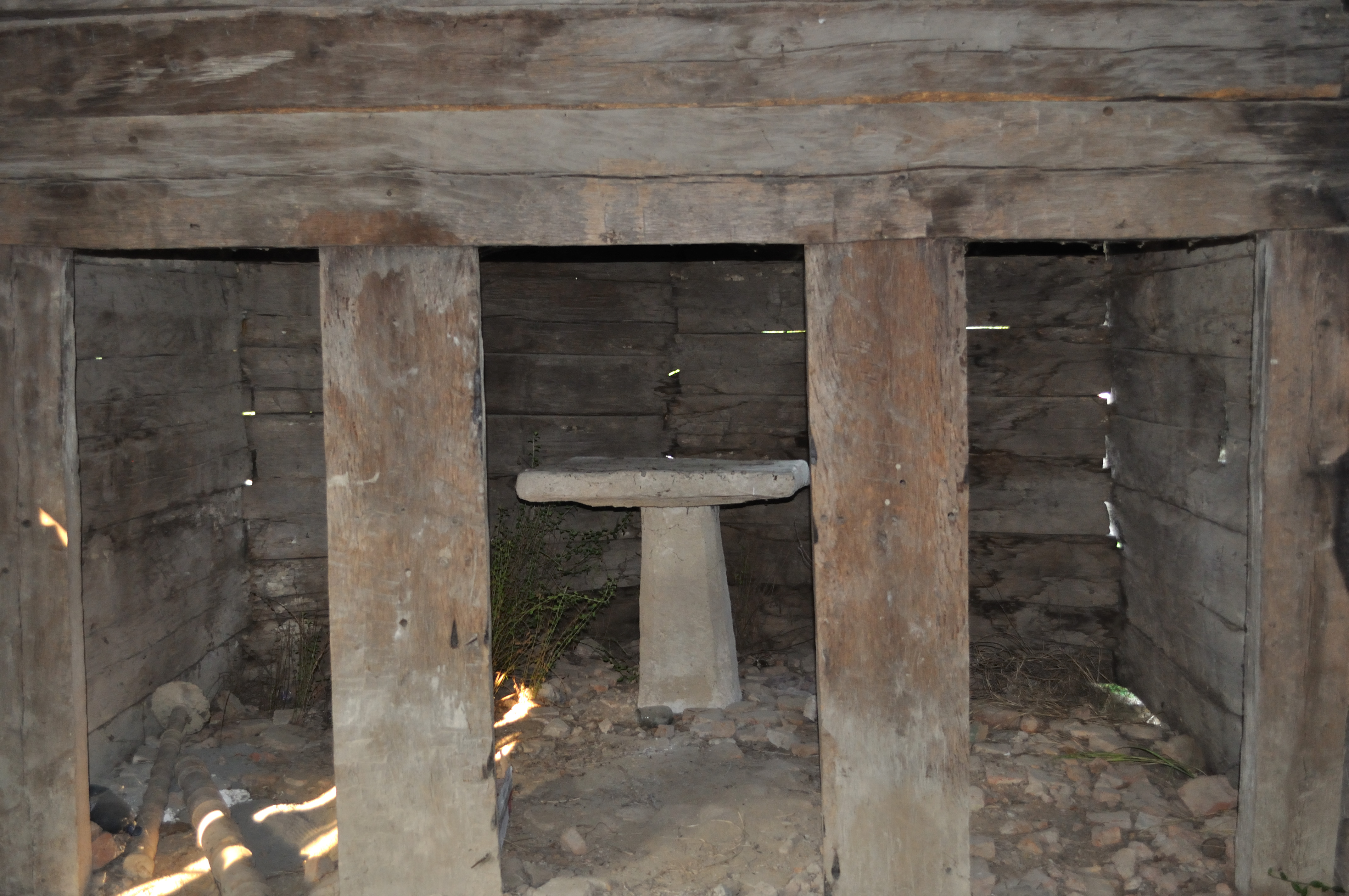 Biserica de lemn „Sf.Voievozi”, sat Pârâu Viu, cătun Glăveni, județul Gorj